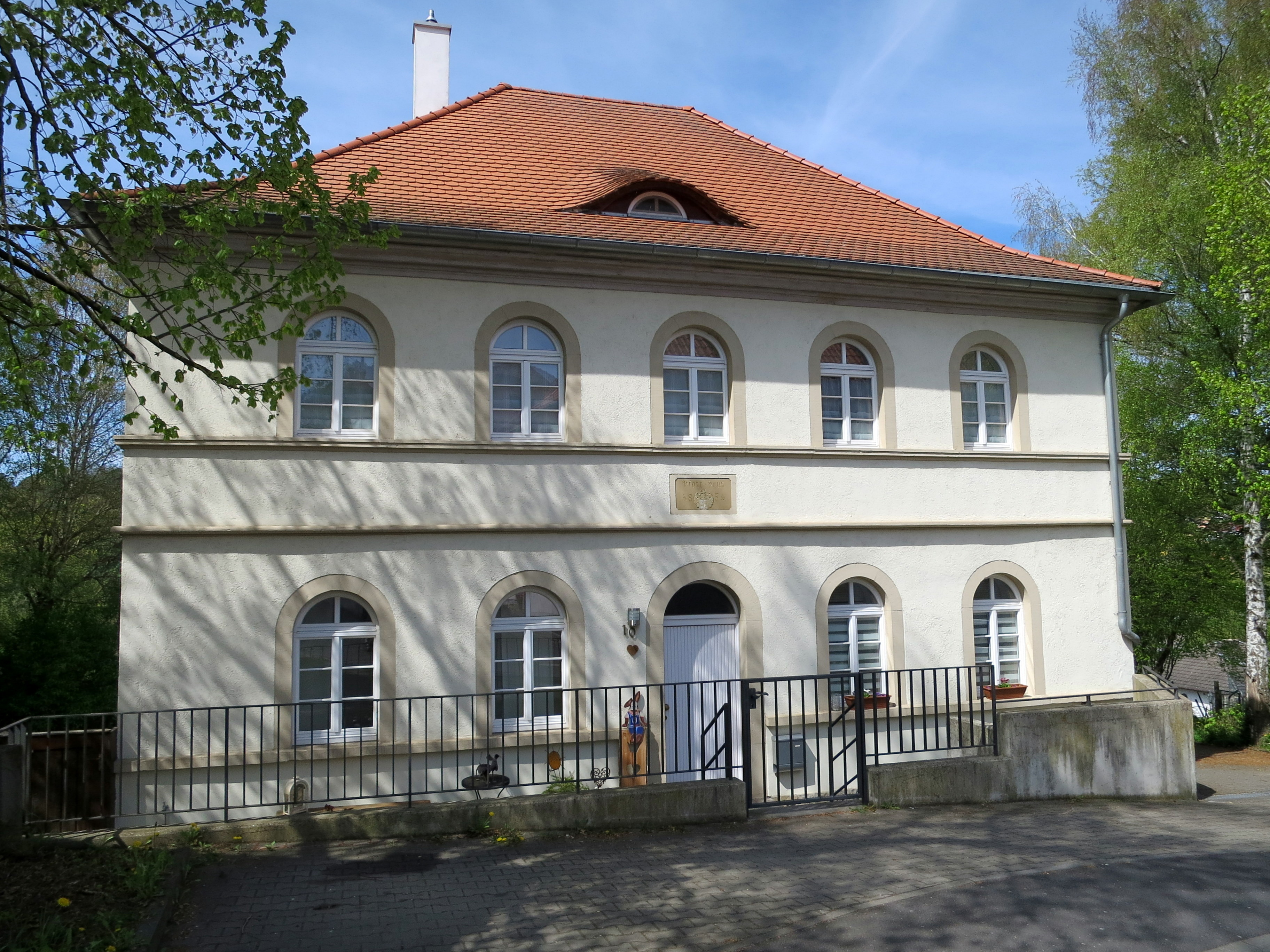 Das Pfarrhaus ist mit dem Jahr 1831 bezeichnet.